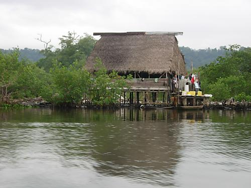 ein Haus in den Bocas del Toro own work